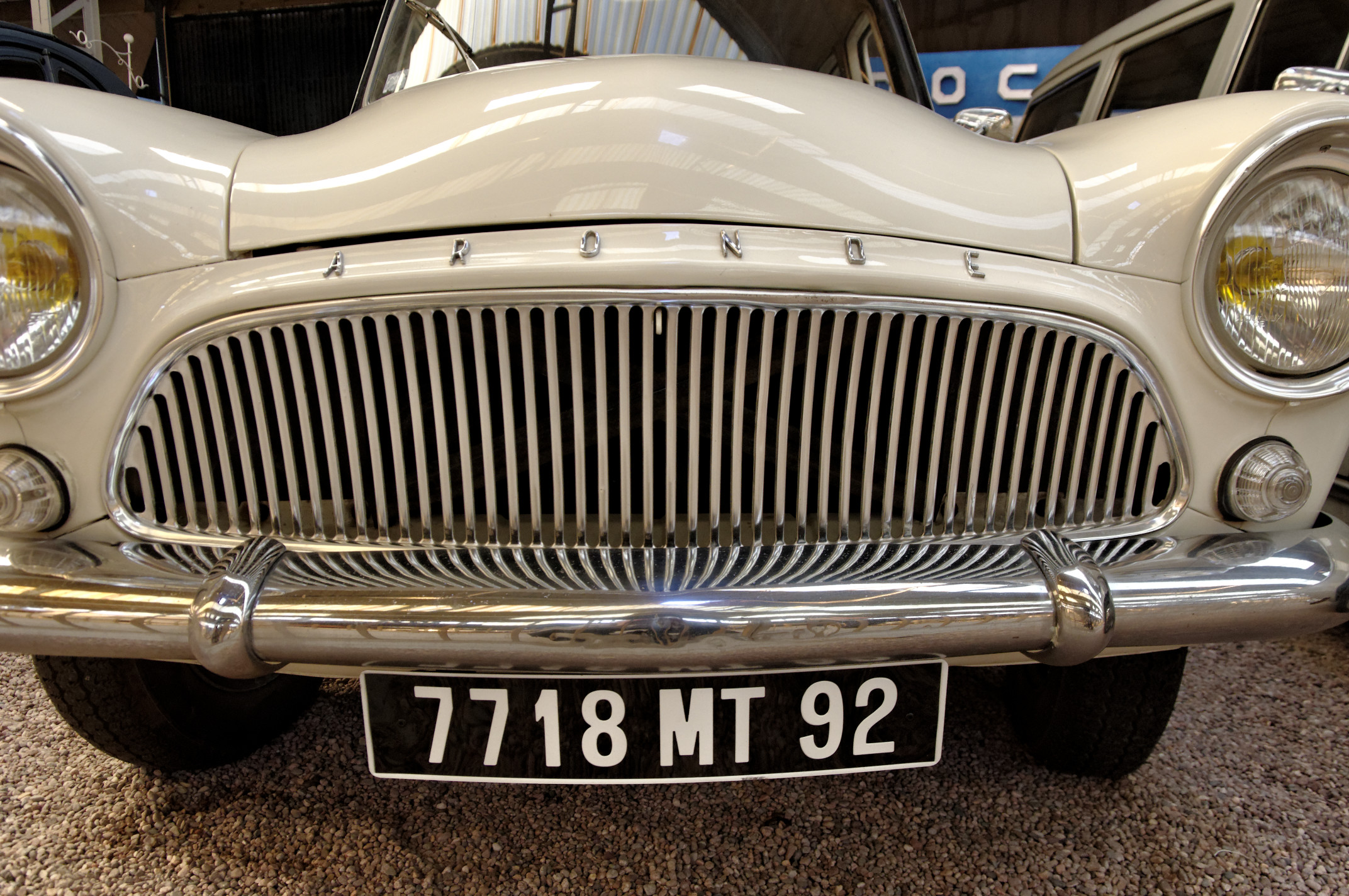 Simca P 60 (1960), Berline, 4 cyl. en ligne, soupapes en tête, 1090 cm3, 40 ch. S.A.E., vitesse max. 110 km/h(Musée Automobile Reims Champagne, Reims, Marne, France)